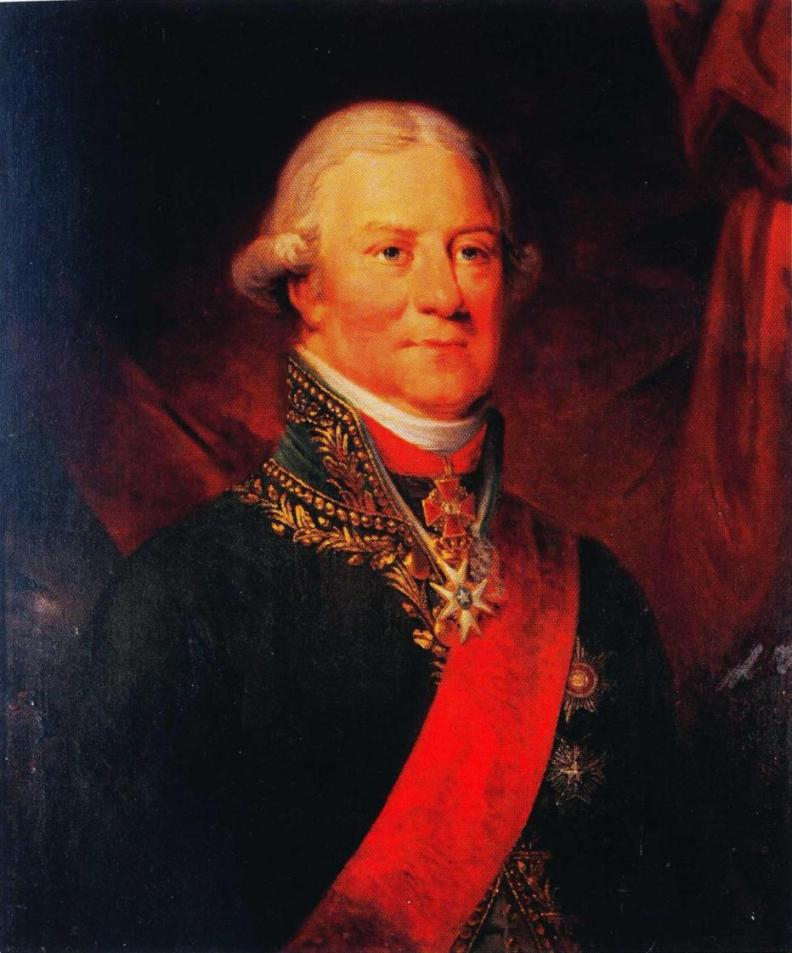 Senaattori ja Turun hovioikeuden presidentti Adolf Tandefelt (1747–1822), muotokuvan omistaa Turun hovioikeus.